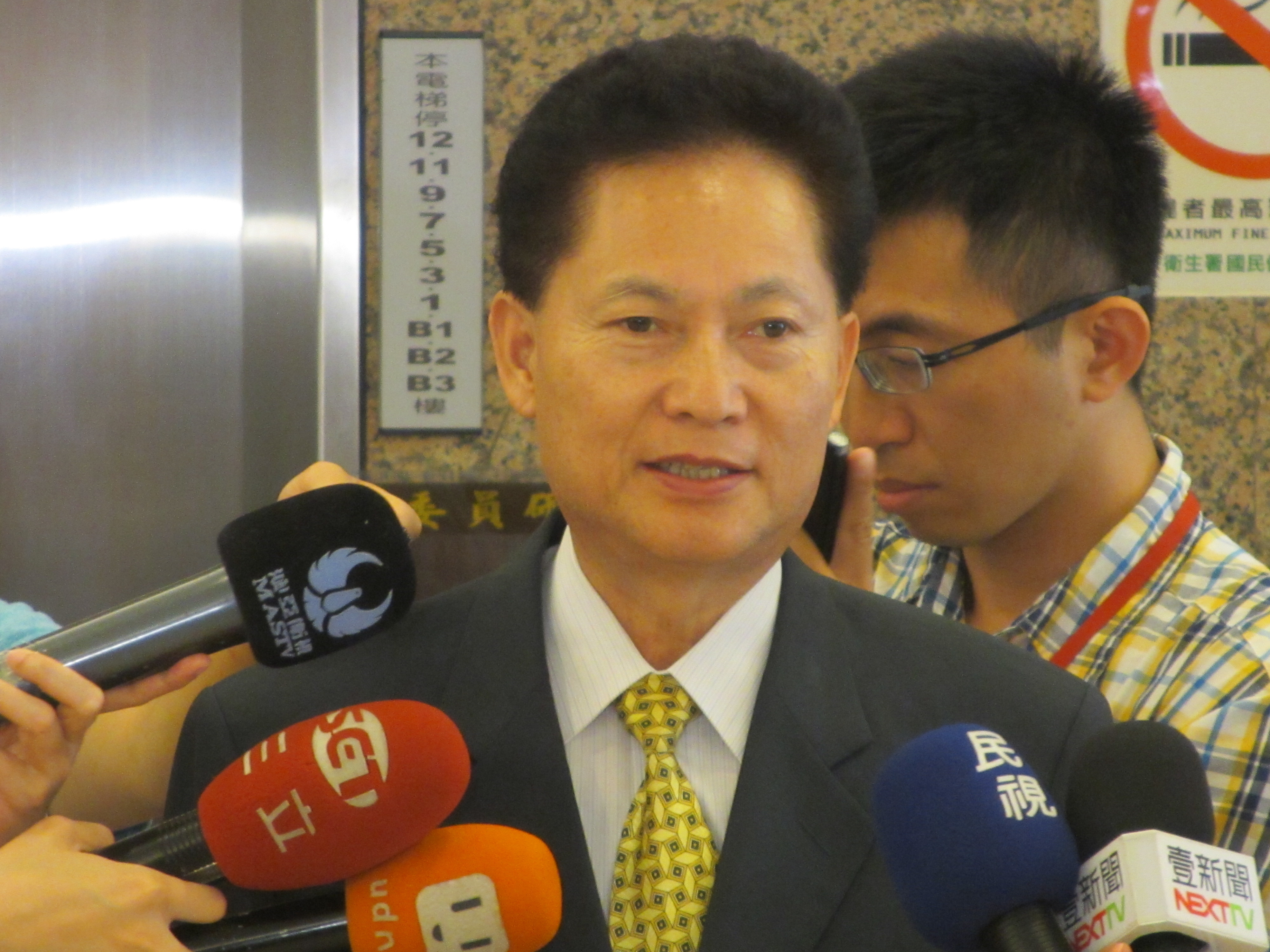 中文（台灣）: 執政黨國民黨立委盧嘉辰(美國之音張永泰)